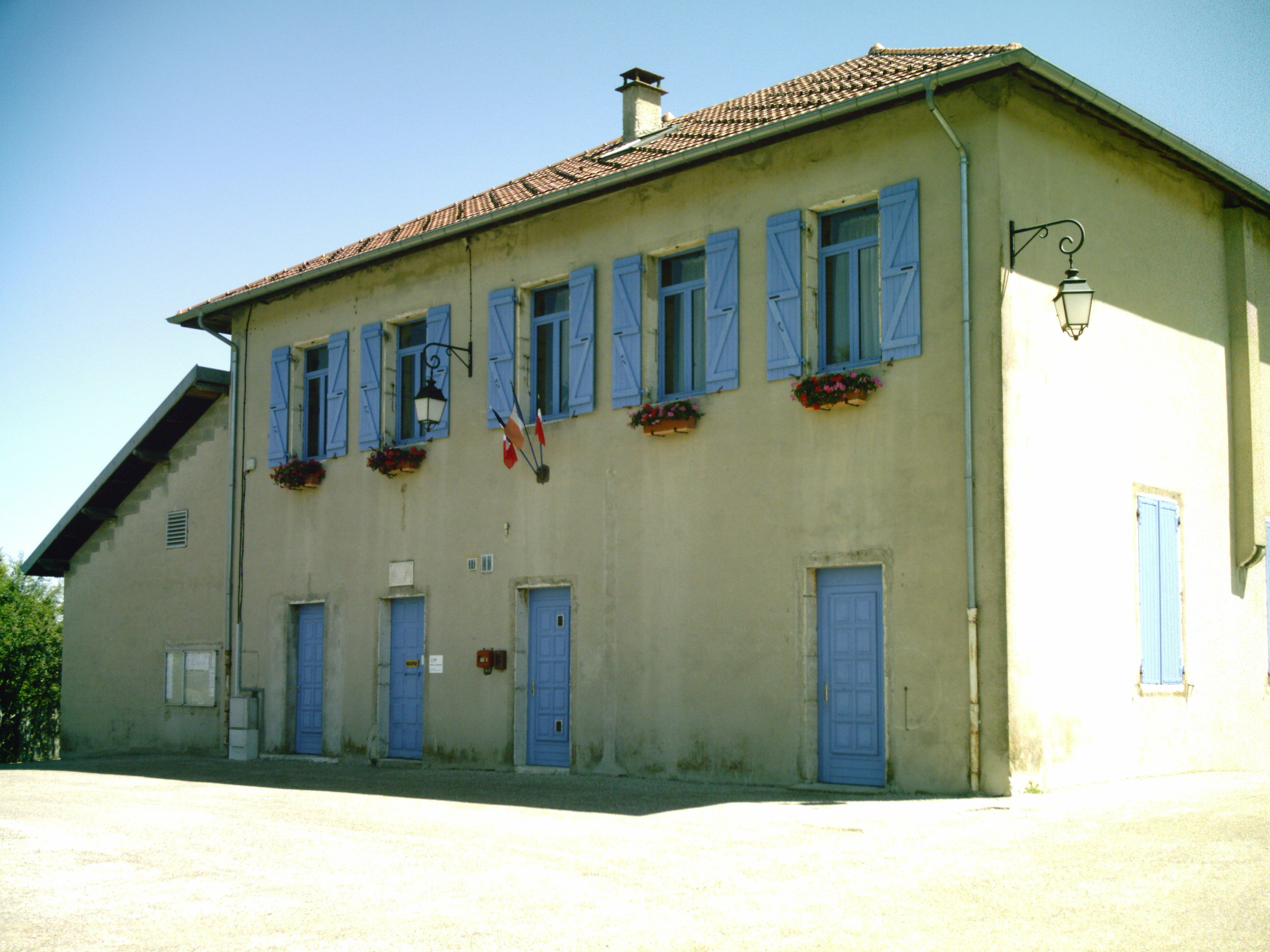 La mairie - salle des fêtes de Sonthonnax-la-Montagne